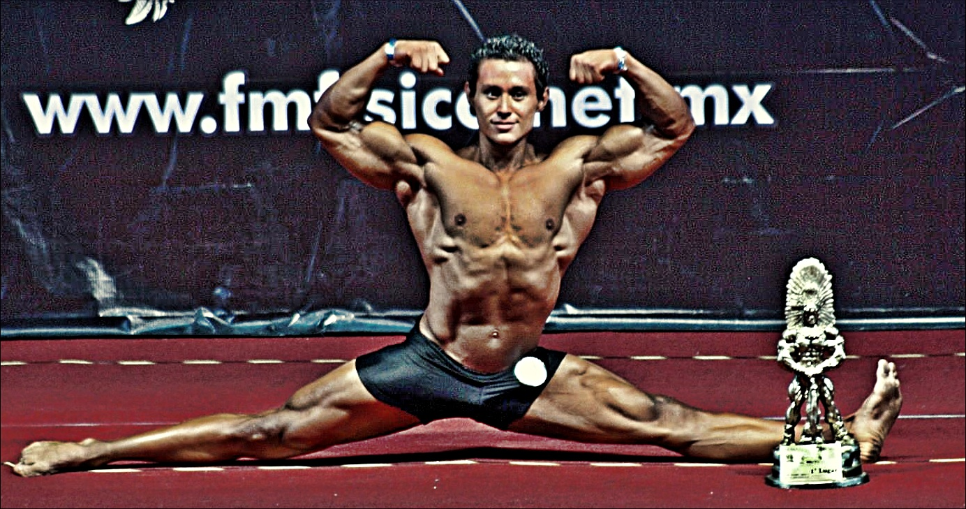 Categoría Fitness Varonil